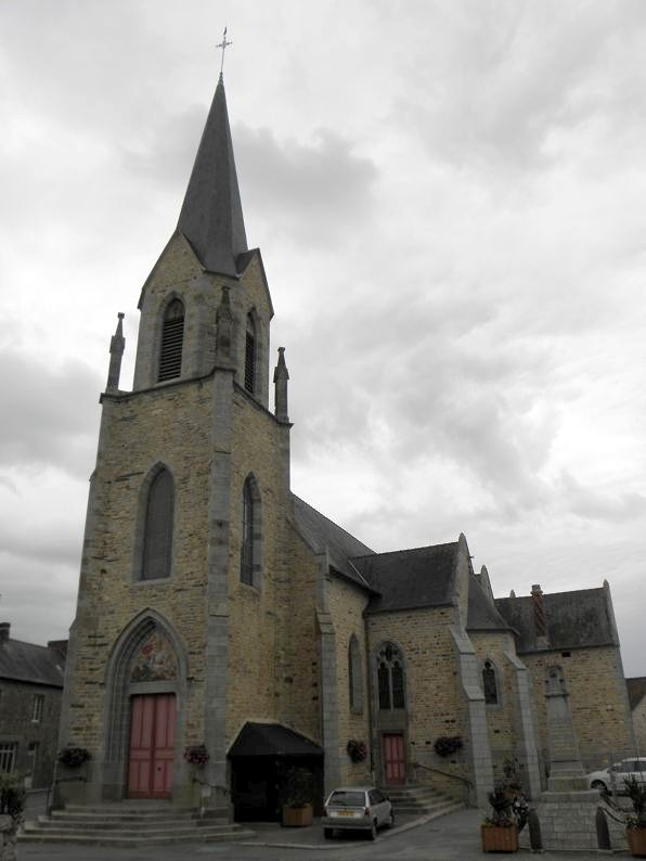 Église Saint-Georges de Châtillon-en-Vendelais (35).